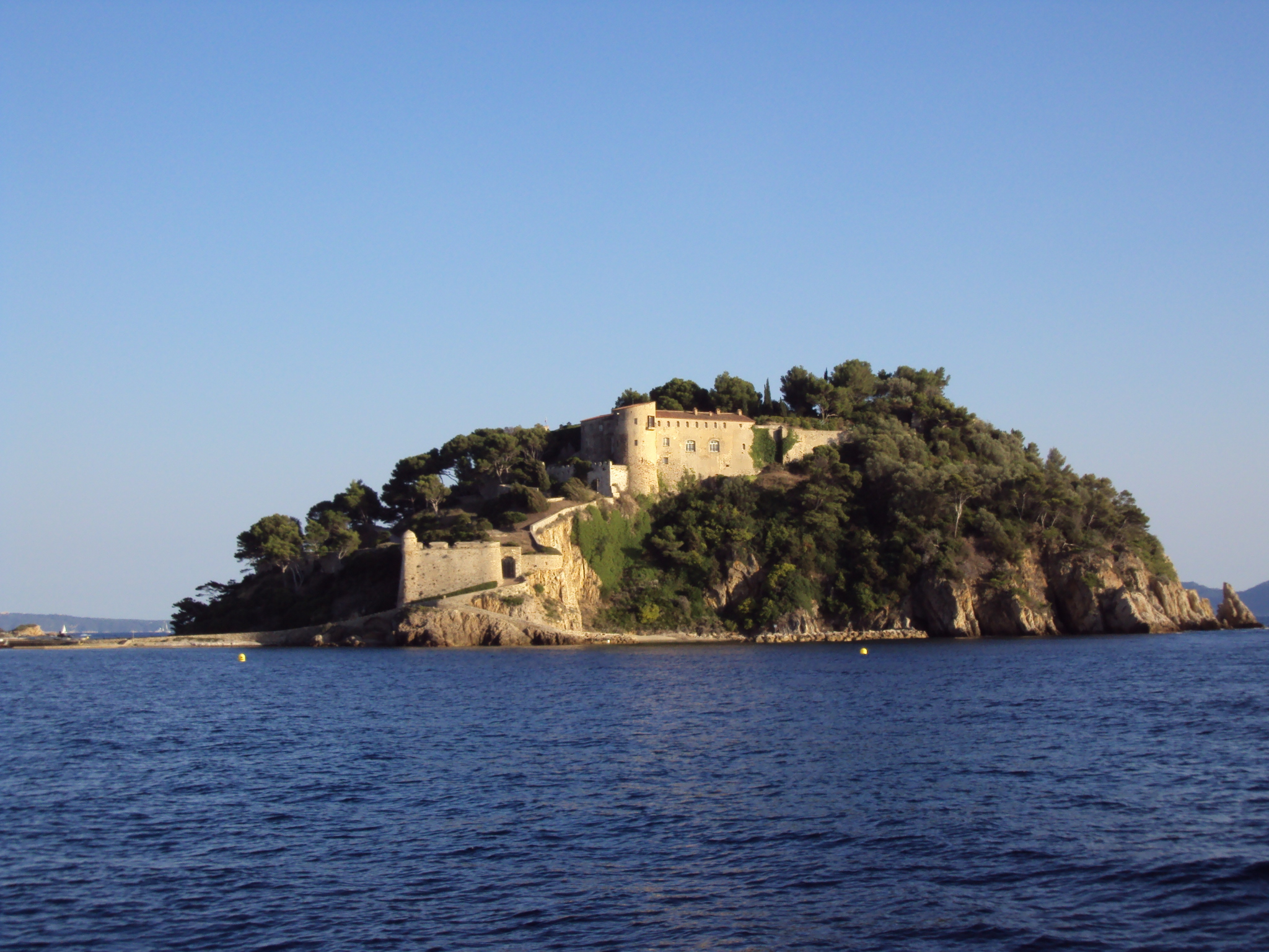 Vue depuis la mer du fort de Brégançon (Bormes-les-Mimosas, Var, France)